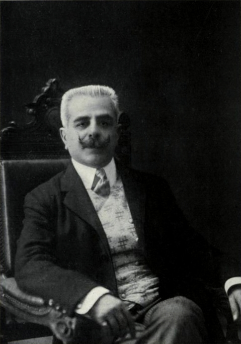 Giovanni Alfredo Cesareo a Messina presso i fratelli Pacino